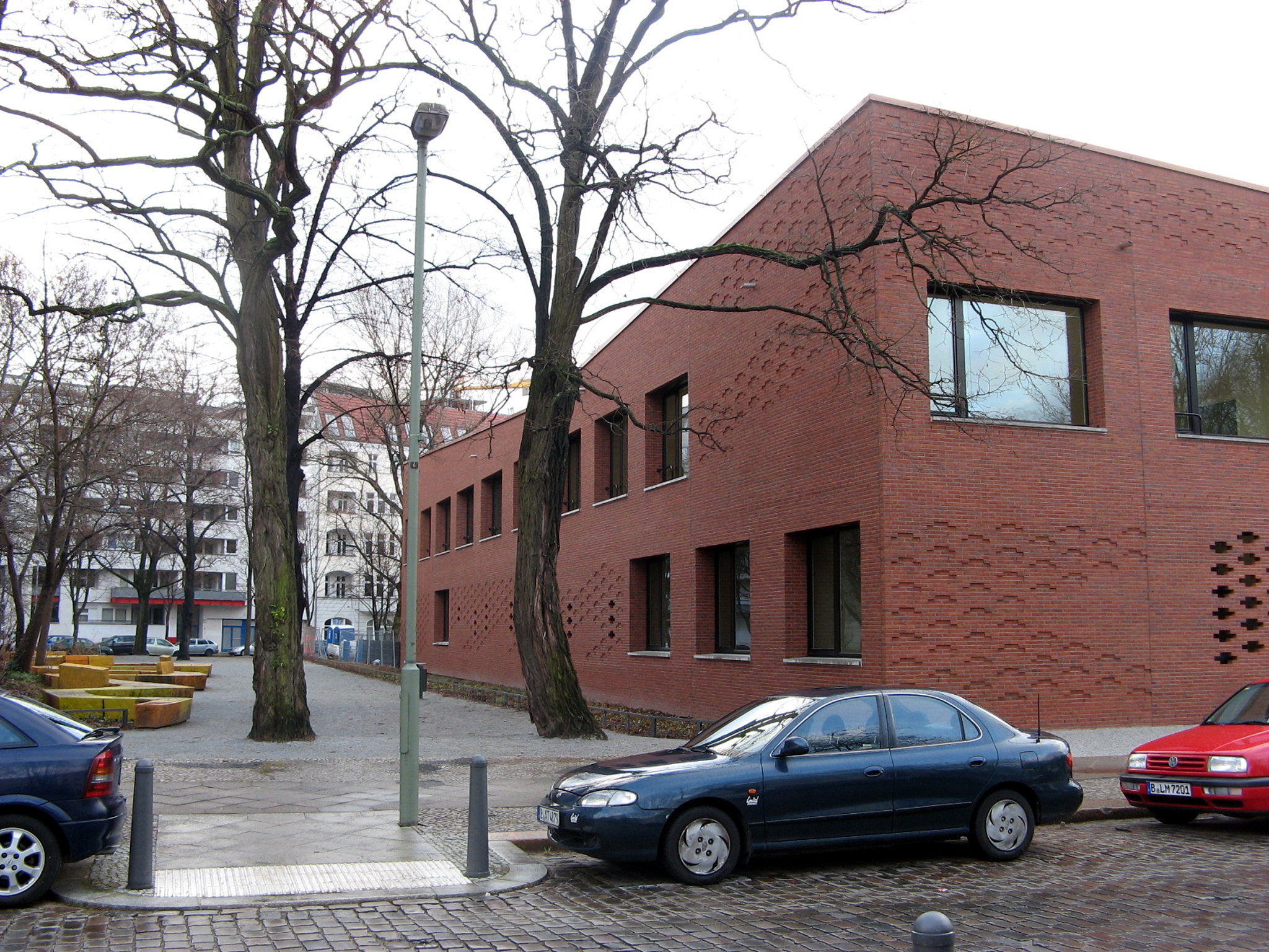 Als Durchwegung zwischen Lasdehner und Kadiner Straße entstand nördlich vom Schulerweiterungsbau der Ludwig-Hoffmann-Grundschule auf ehemaligem Schulgelände Grünanlage, deren Hauptattraktion eine 88 Meter lange geschwungene gelb-orangene Bank als Sitz- und Balancierfläche ist.